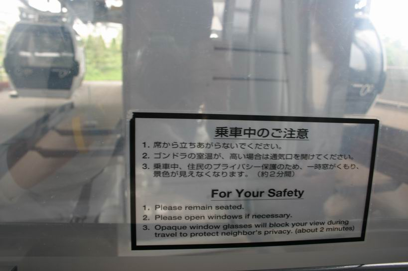 Gondola glass at Aichi Expo 2005